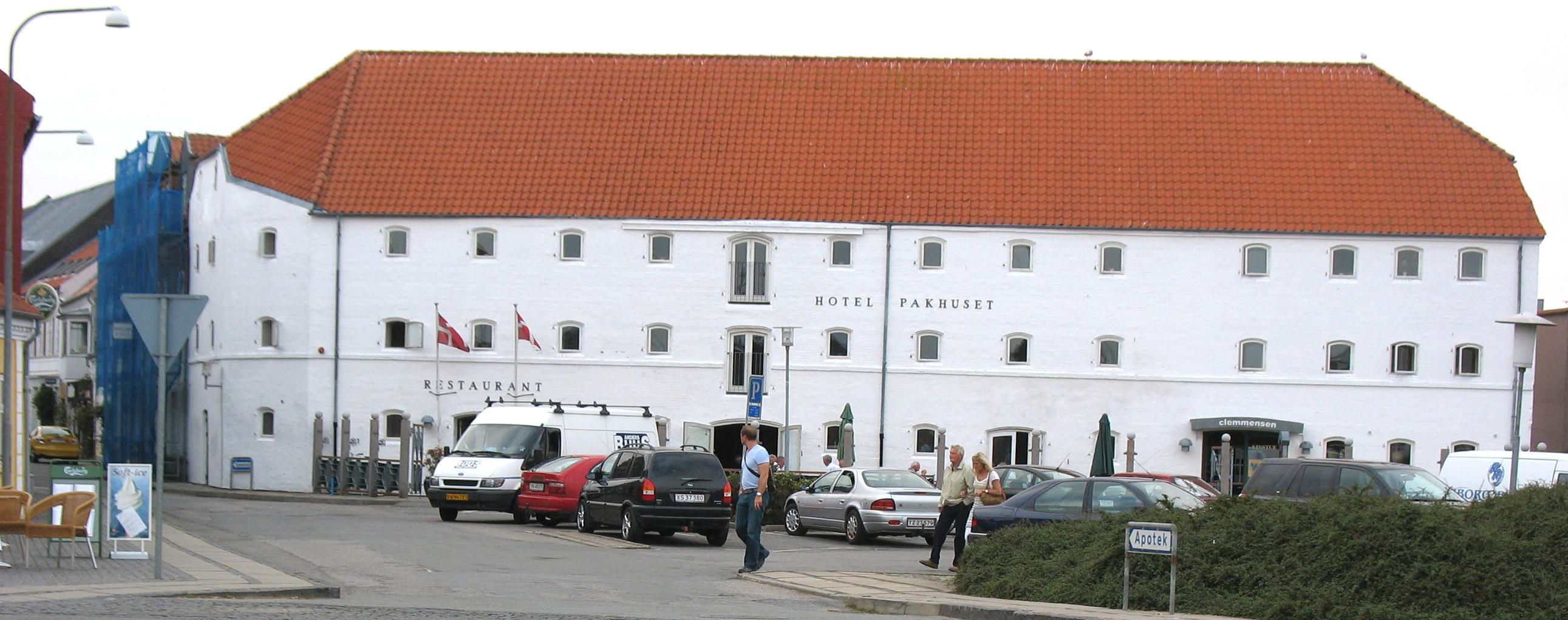 Hotel Pakhuset.